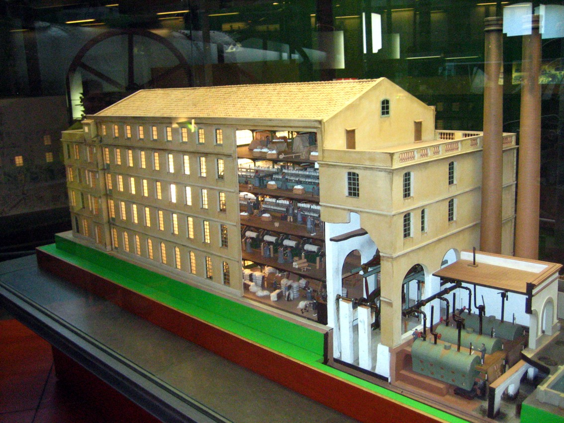 Vapor Vell de Sants (Barcelona) at Museu de la Ciència i de la Tècnica de Catalunya (Terrassa)